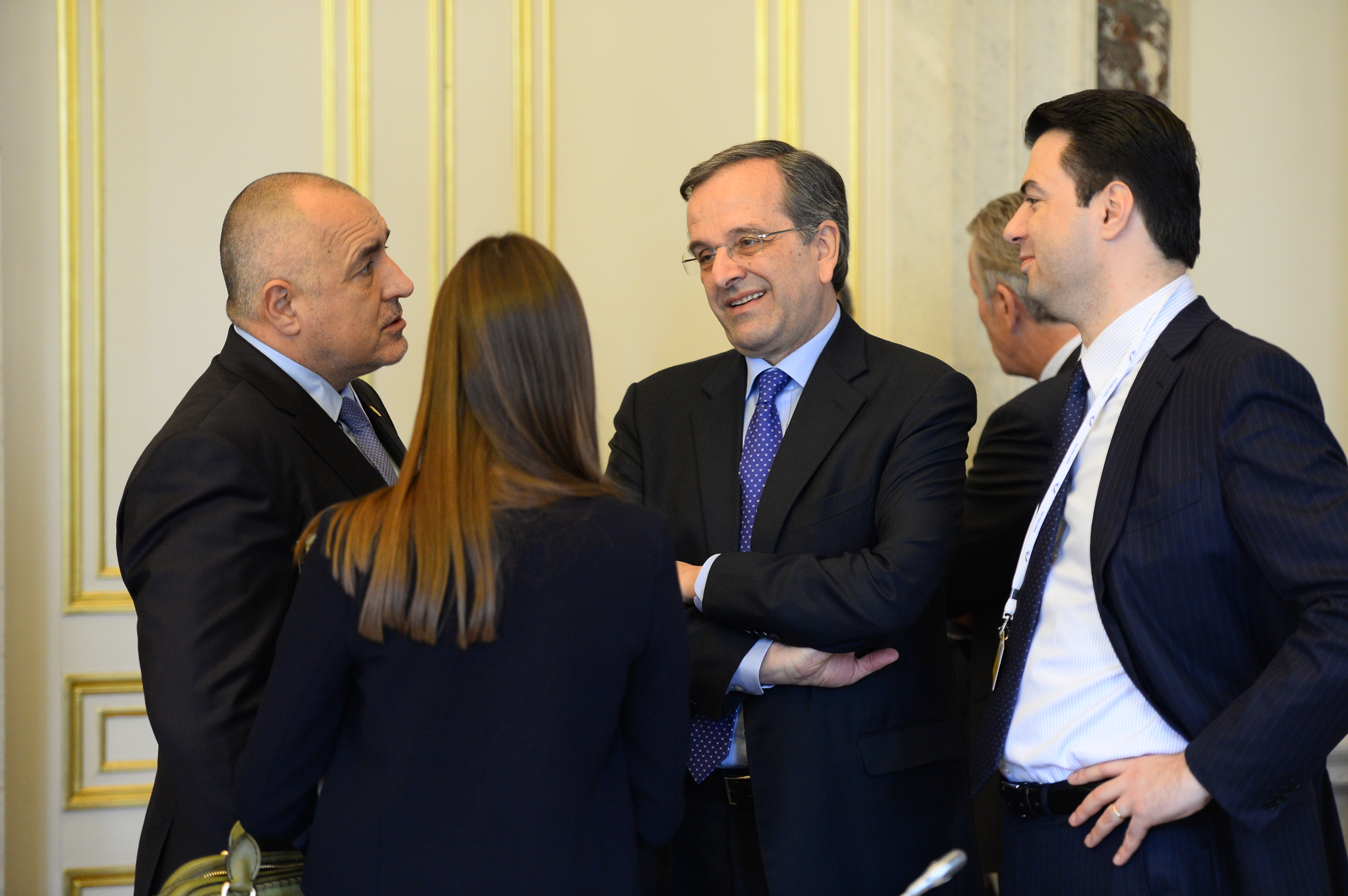 EPP Summit, March 2015, Brussels